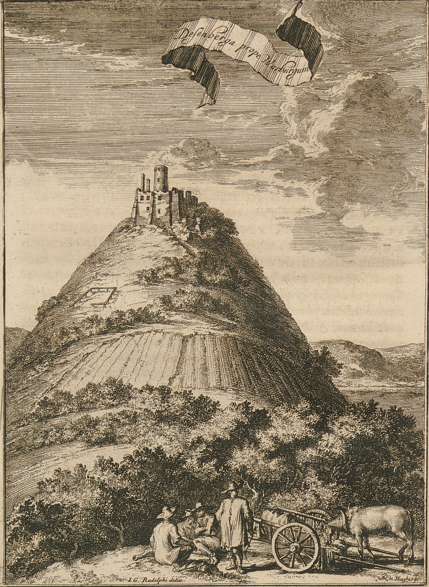 Burg Desenberg, Warburg; Radierung von Romeyn de Hooghe nach einer Vorlage von J. G. Rudolphi aus dem Jahr 1672